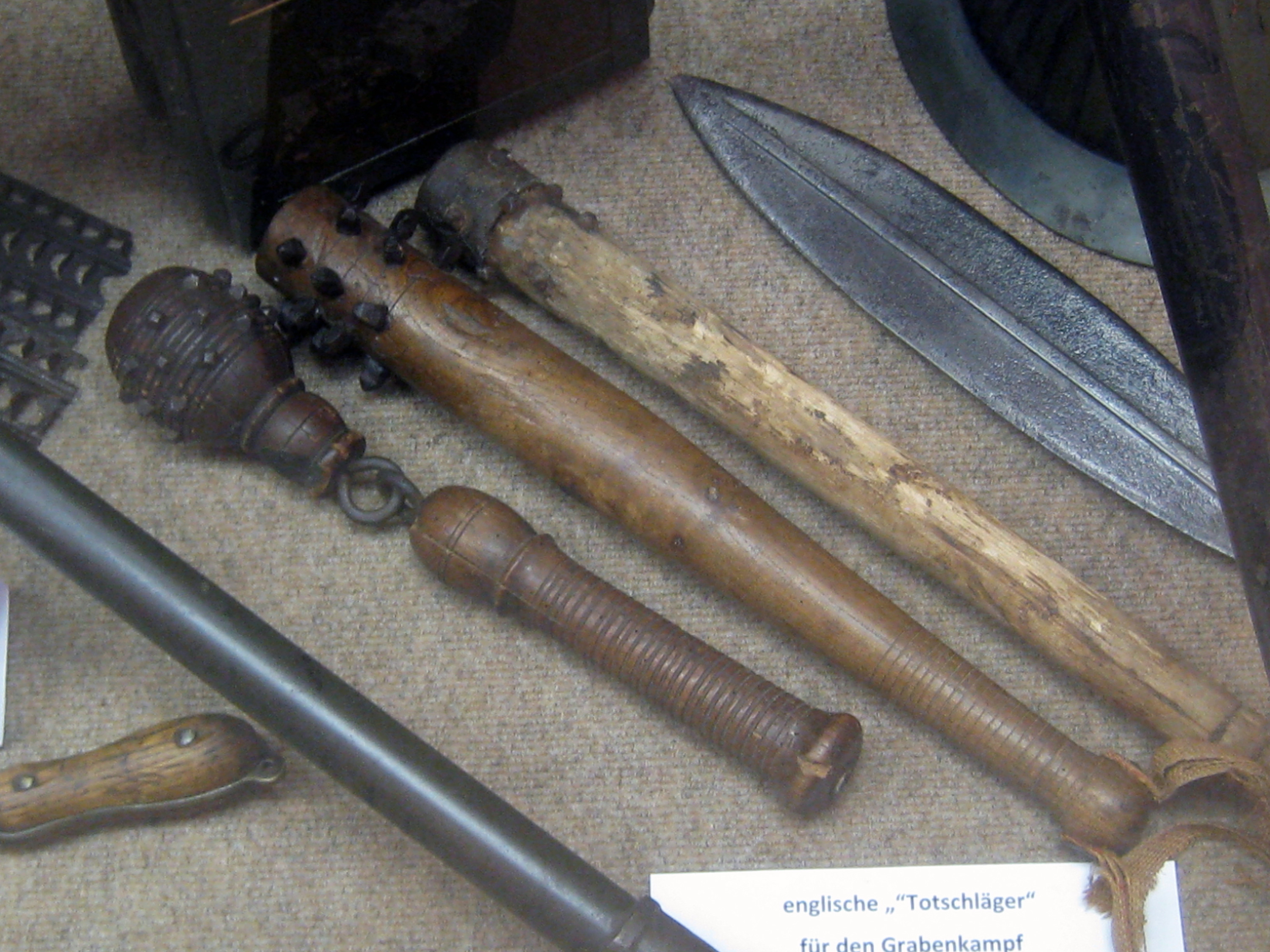 britische Grabenkeulen im Festungsmuseum Reuenthal